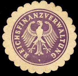 Sealing stamp Title: Reichsfinanzverwaltung Description: violett, weiß, geprägt Place: Berlin size: 4 cm